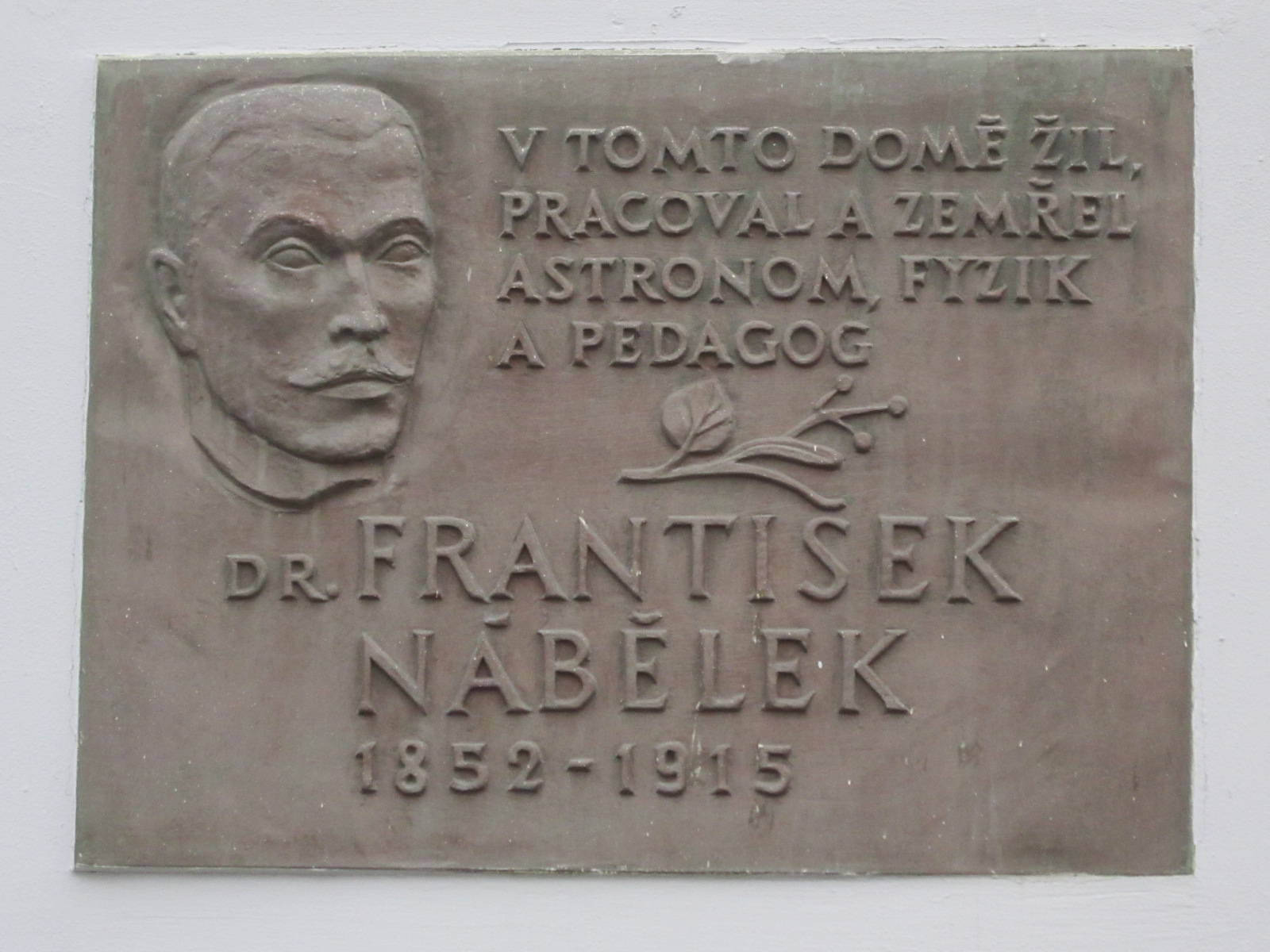 pamětní deska Františka Nábělka v Kroměříži